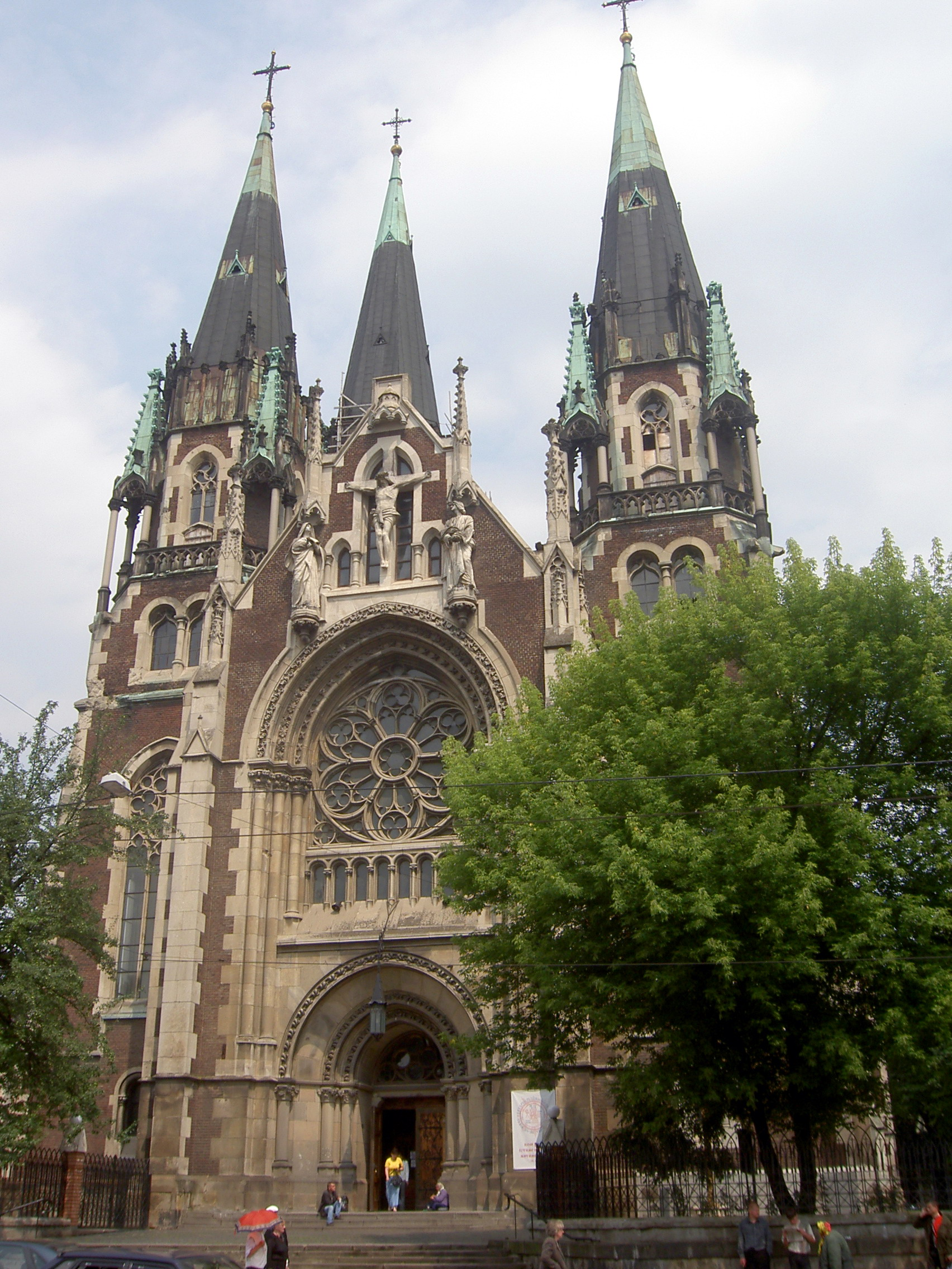 Kostel svaté Olgy a Alžběty ve Lvově